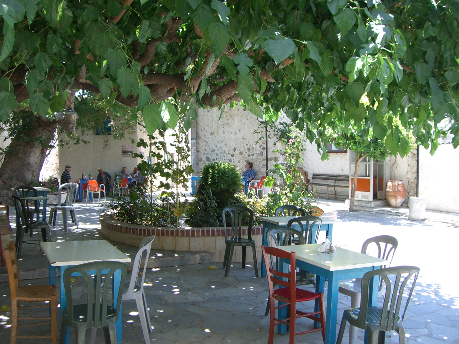 Stavrochorio, ein Bergdorf in Ostkreta